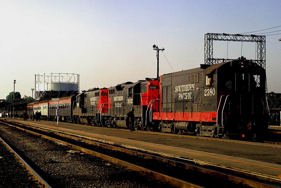 Del Monte San Jose